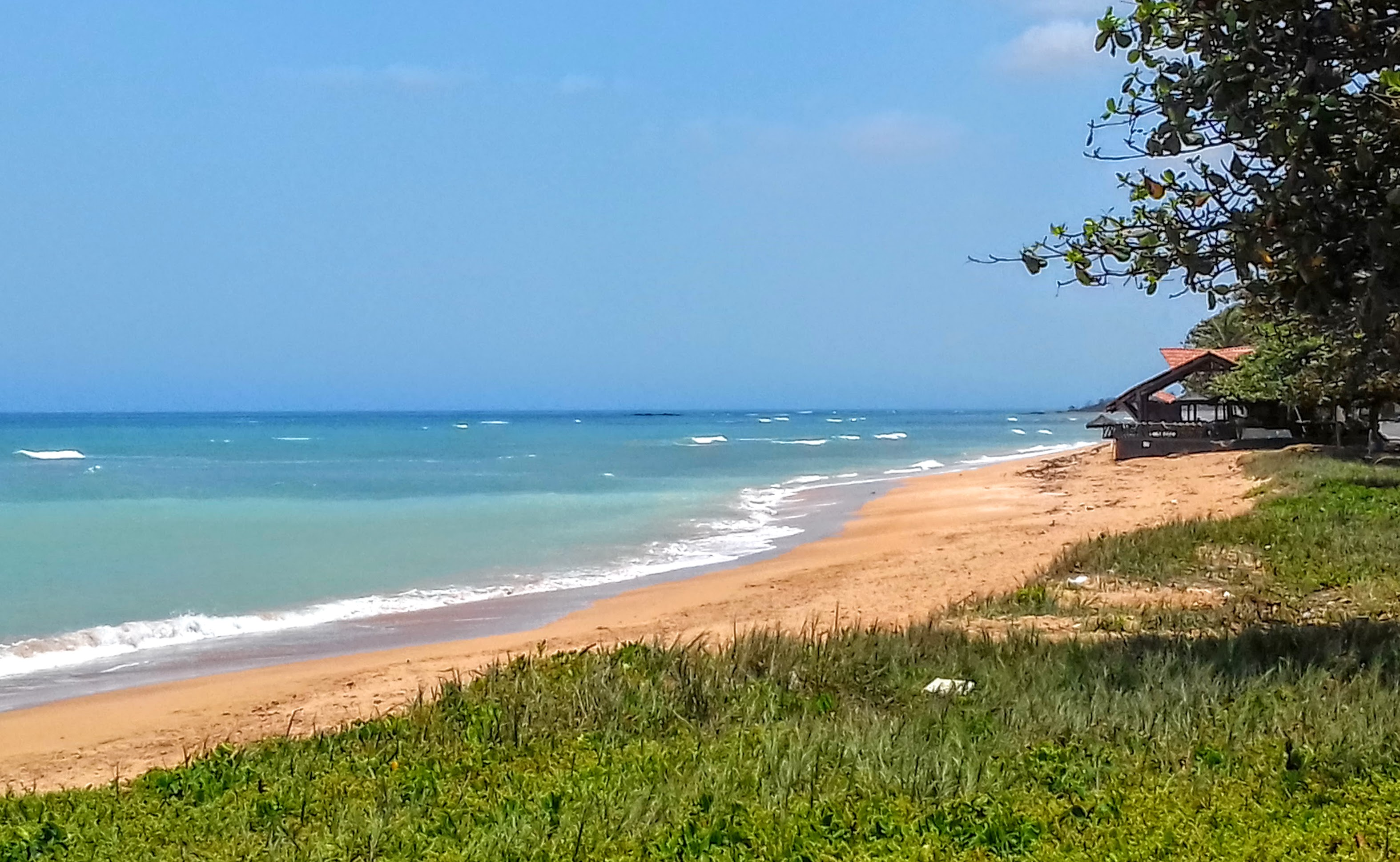 A praia de Barra do Sahy, point do verão